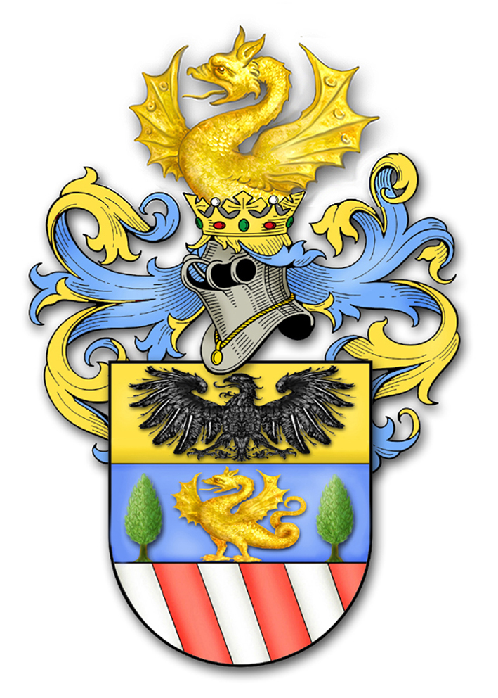 Brasão Longhi de Vermiglio-Tonale, Val di Sole, Itália. A cimeira foi adotada pelo ramo brasileiro, fundado por Ignazio Longhi, emigrado para o Brasil no século XIX, deixando descendência em várias cidades dos estados do Rio Grande do Sul e de Santa Catarina.